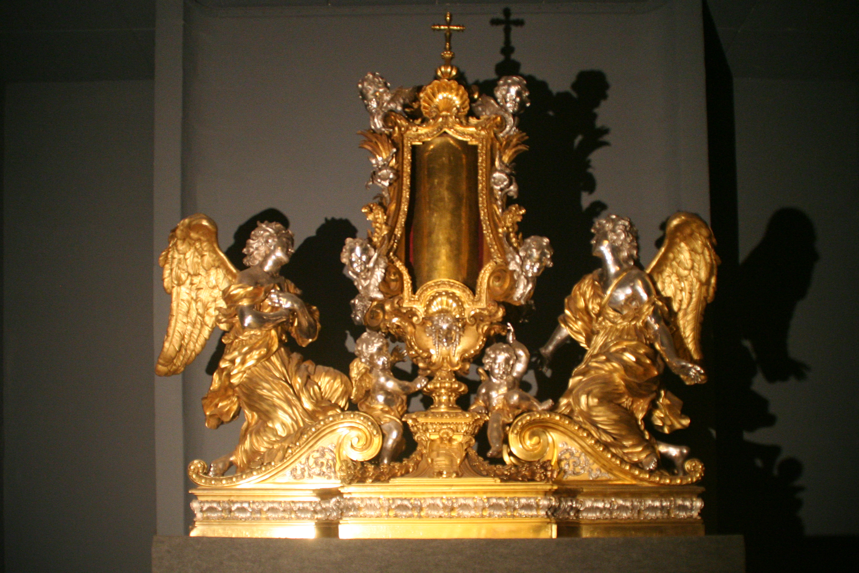 ostensoir en bronze doré destiné à recevoir les reliques de l'avant bras de saint Jean le Baptiste. œuvre de Ciro Ferri (1634-1689). Actuellement en la co-cathédrale St John's de Valletta à Malte. Reliquaire ayant appartenu à l'ordre de Saint-Jean de Jérusalem et laissé à Malte lors du départ de l'Ordre